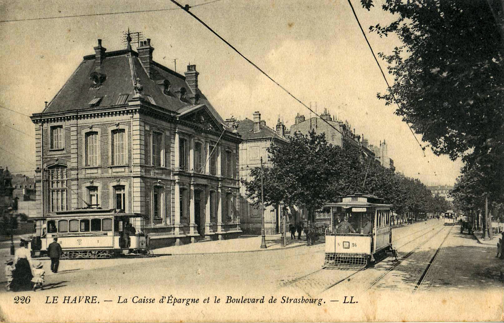 Carte postale ancienne éditée par LL, n°226 : La Caisse d'Epargne et le Boulevard de Strasbourg